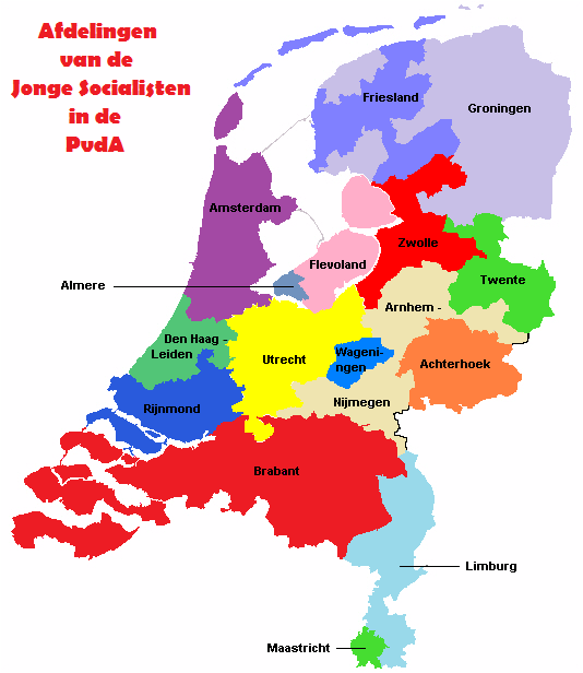 JS Afdelingen